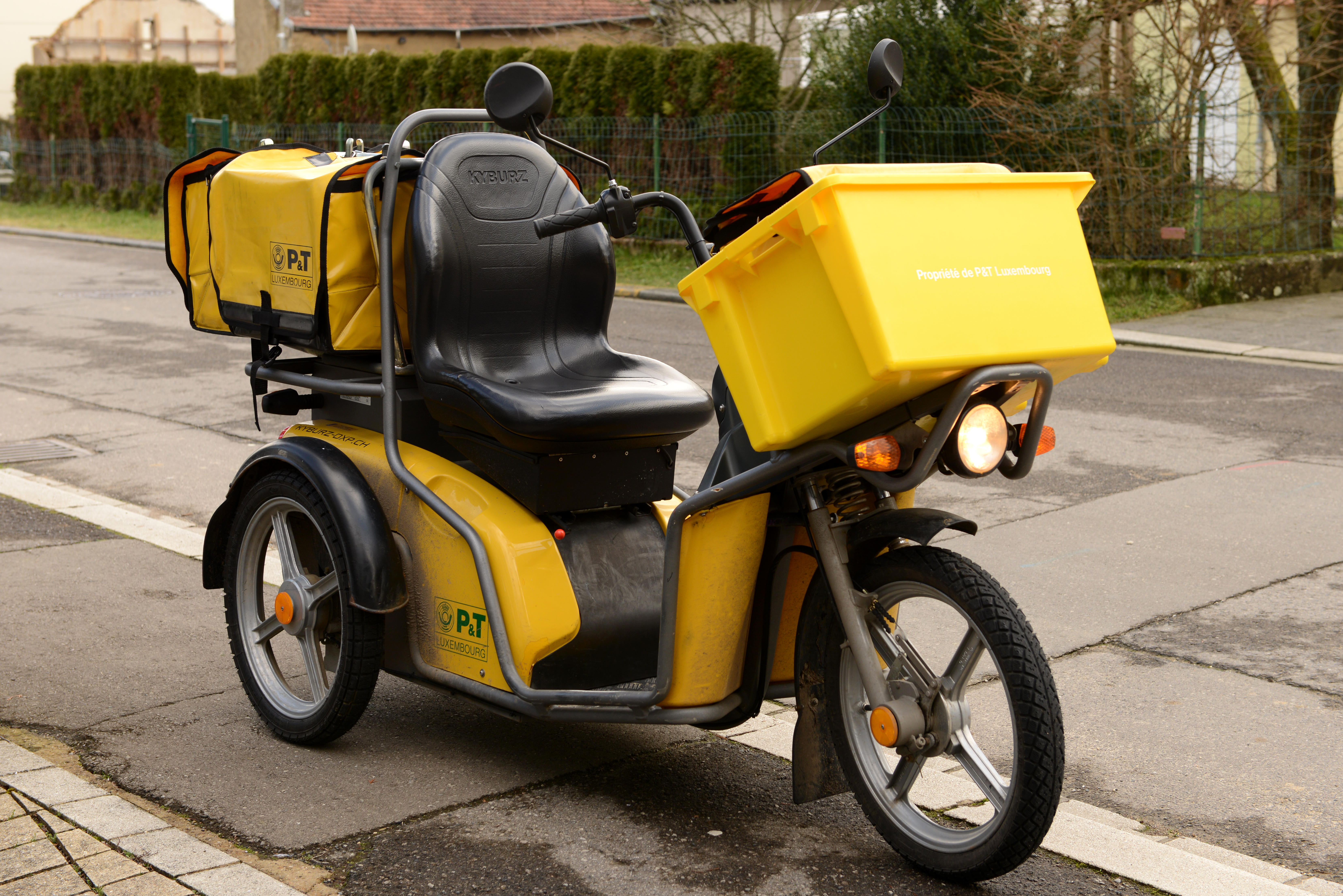 De Facteur op Rieder - e "Kyburz-DXP" vun der Lëtzebuerger Post.